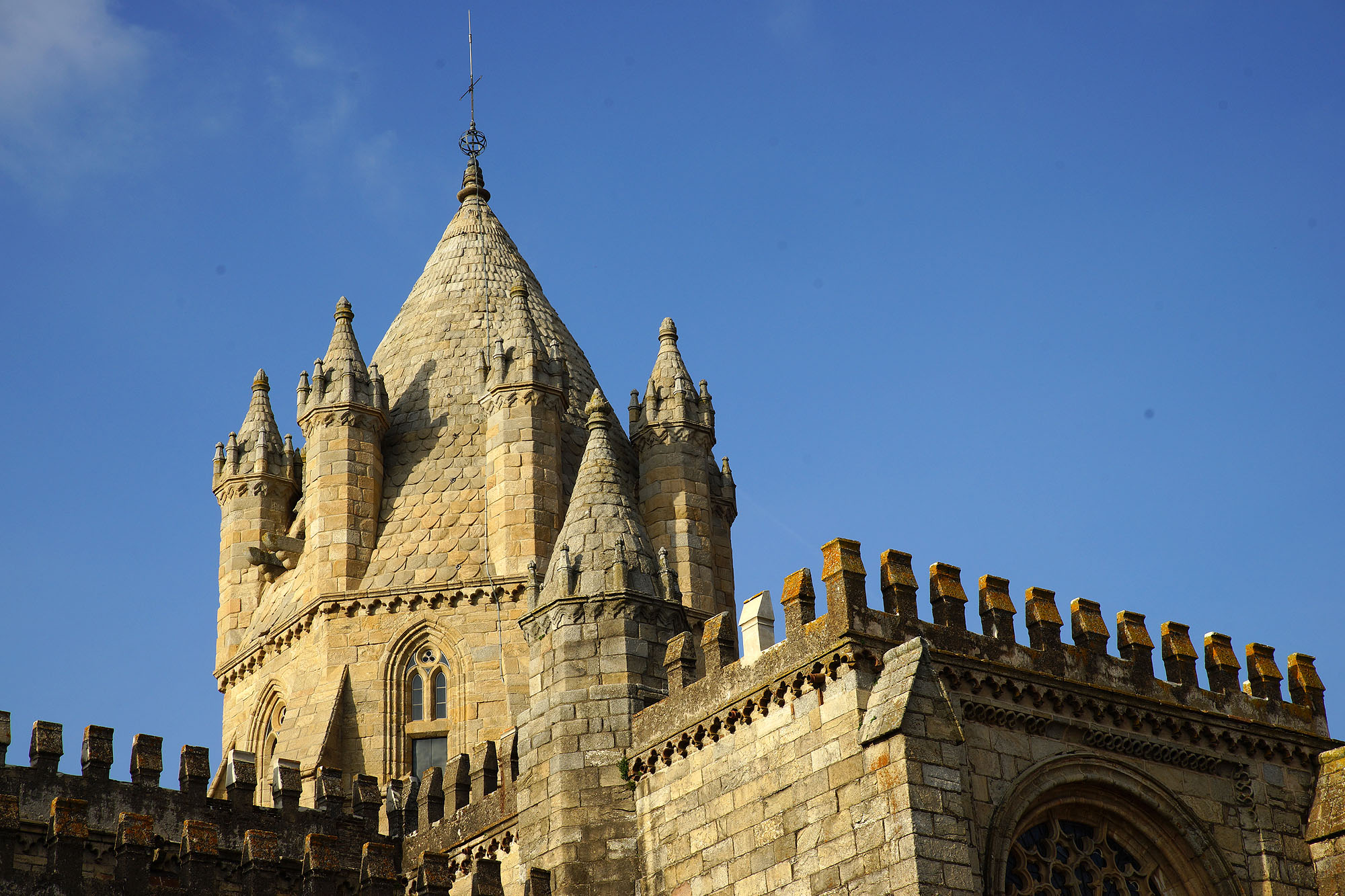 EVORA EVORA Cathedral (Wiki): EVORA (Wiki)